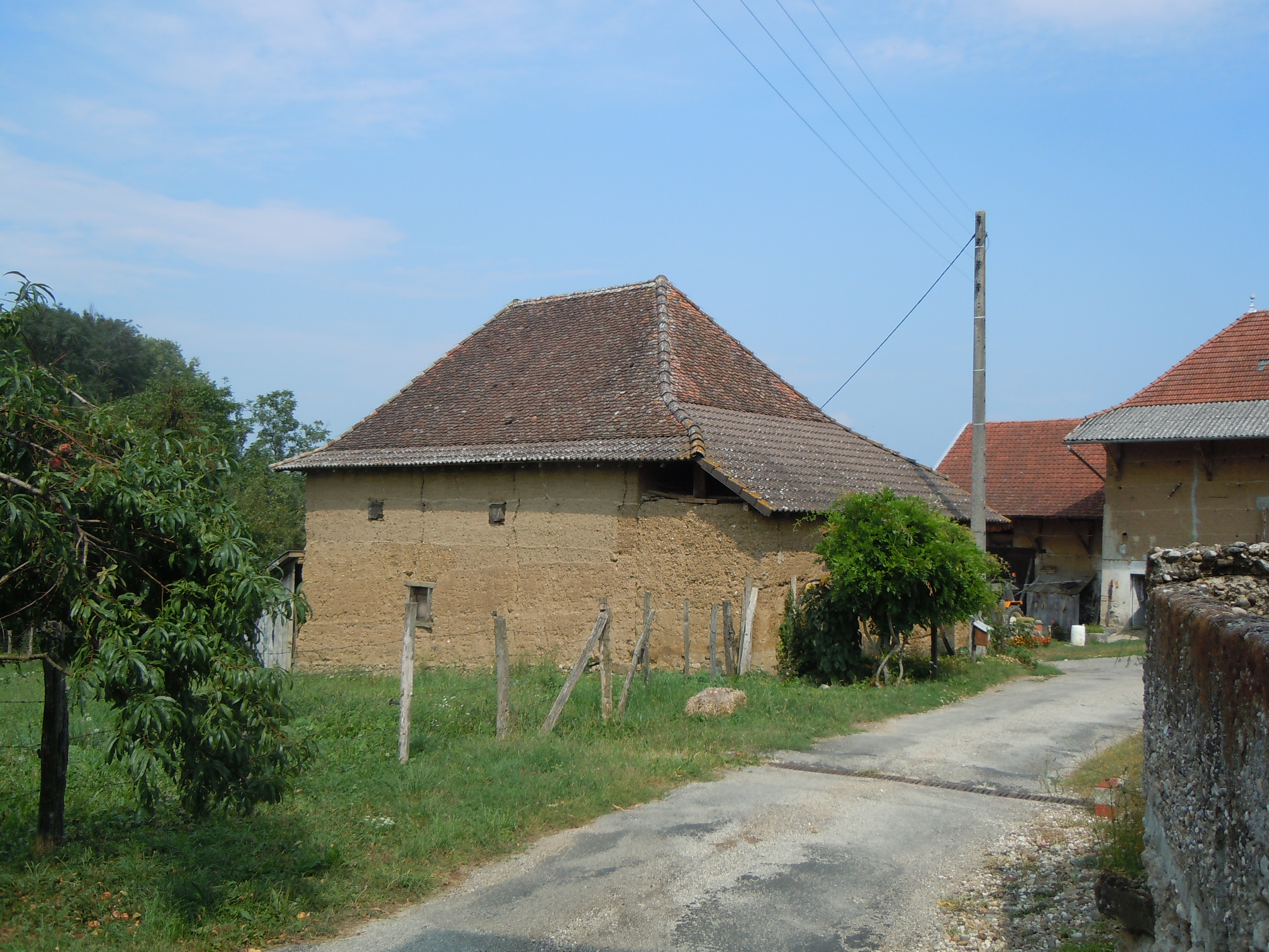 Granieu- Ferme au hameau de la Chèvre - Isère - France